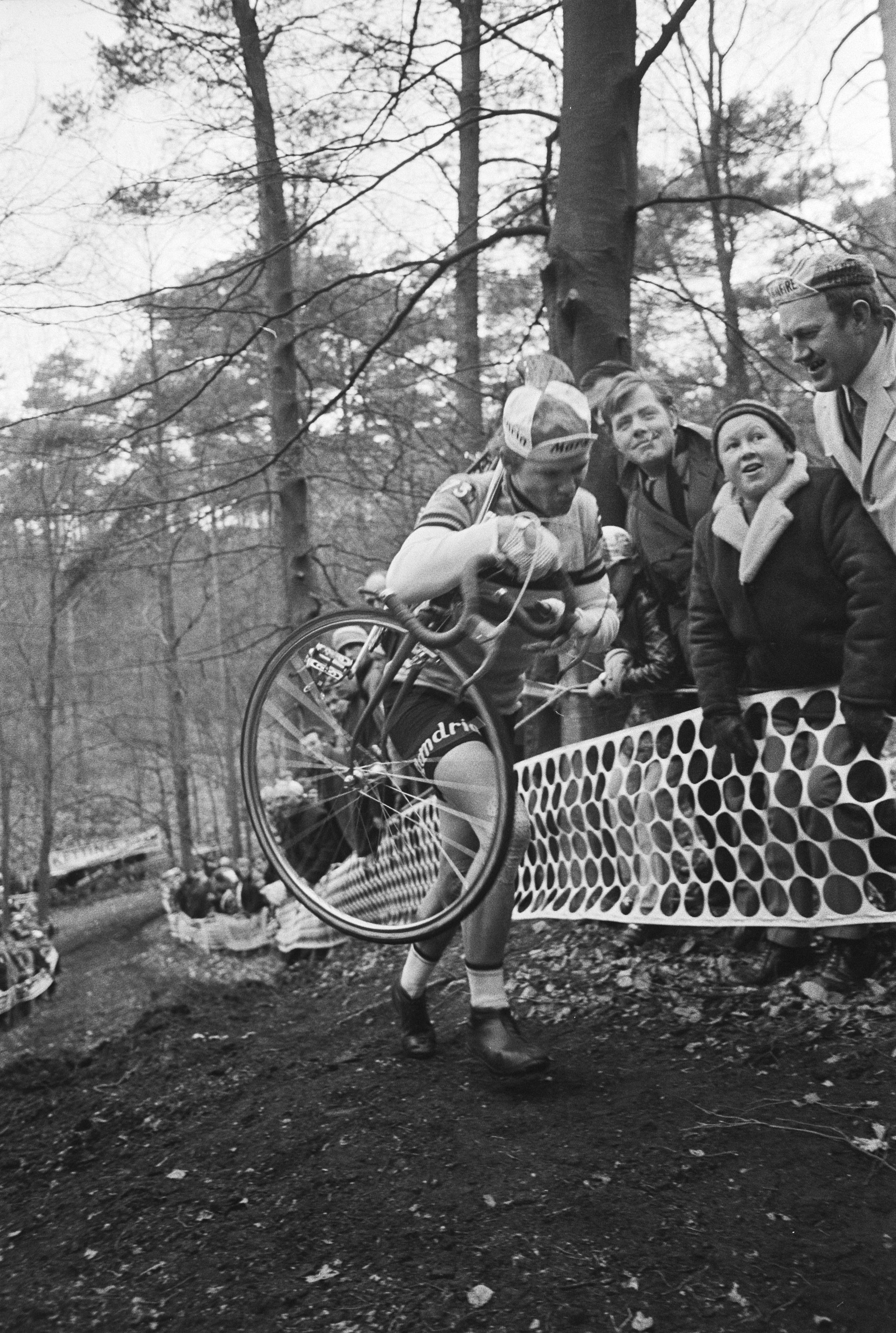 Wereldkampioenschappen veldrijden op de fiets, Apeldoorn; nr. 9, 11: E. de Vlaeminck in aktie; nr. 10, 12: C. Zoontjes in aktie.